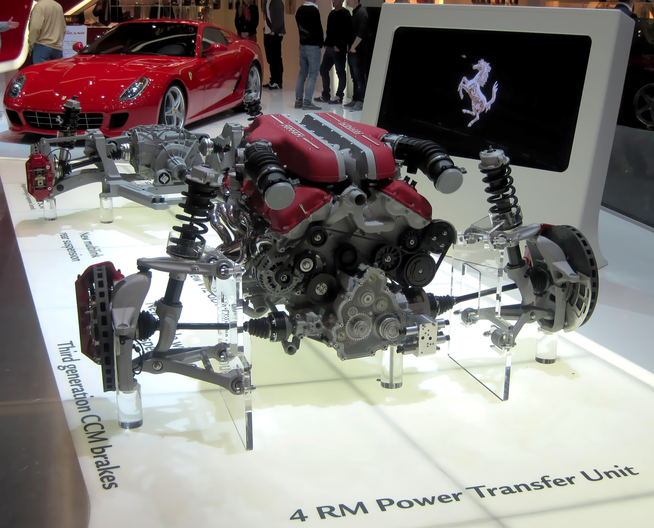 Ferrari FF 81° Salone dell'auto di Ginevra, 2011